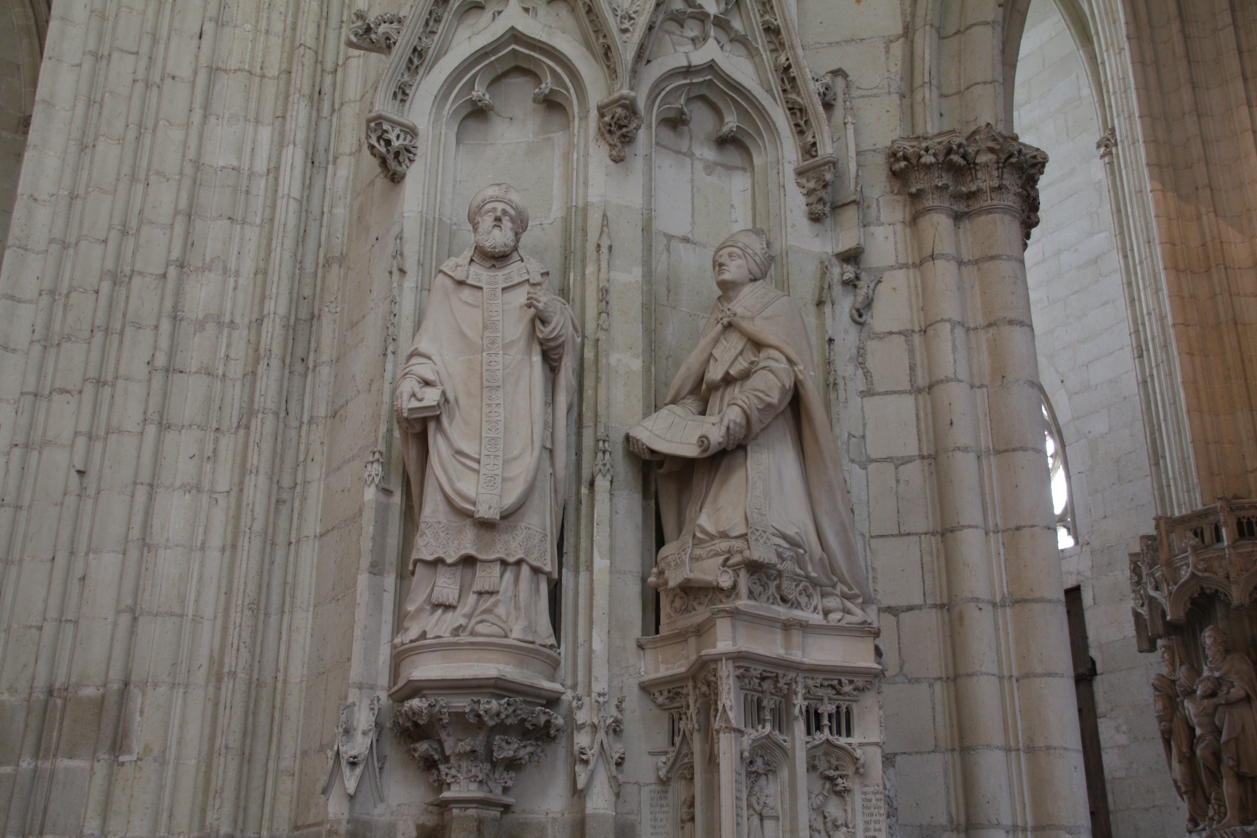 Intérieur de la Cathédrale Saint-Pierre-et-Saint-Paul de Nantes